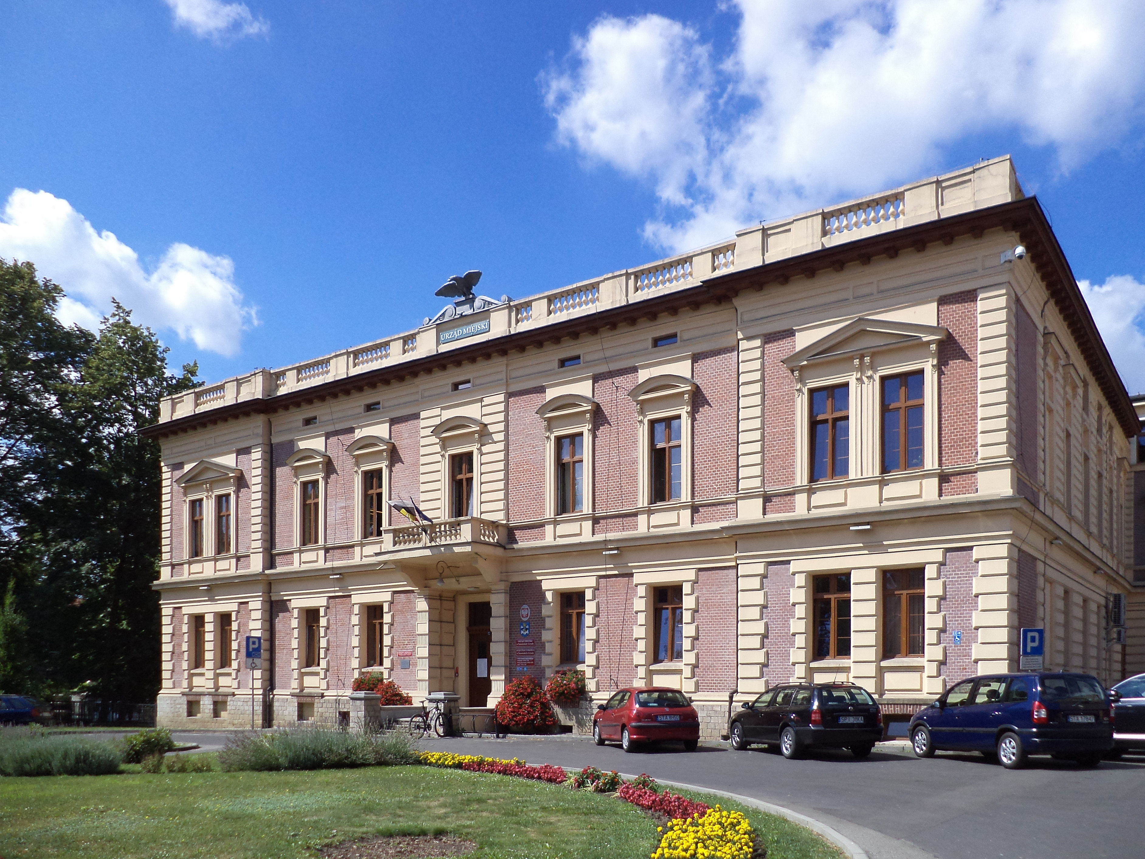 Budynek Urzędu Miasta Tarnowskie Góry przy ul. Sienkiewicza 2 (dawna landratura)